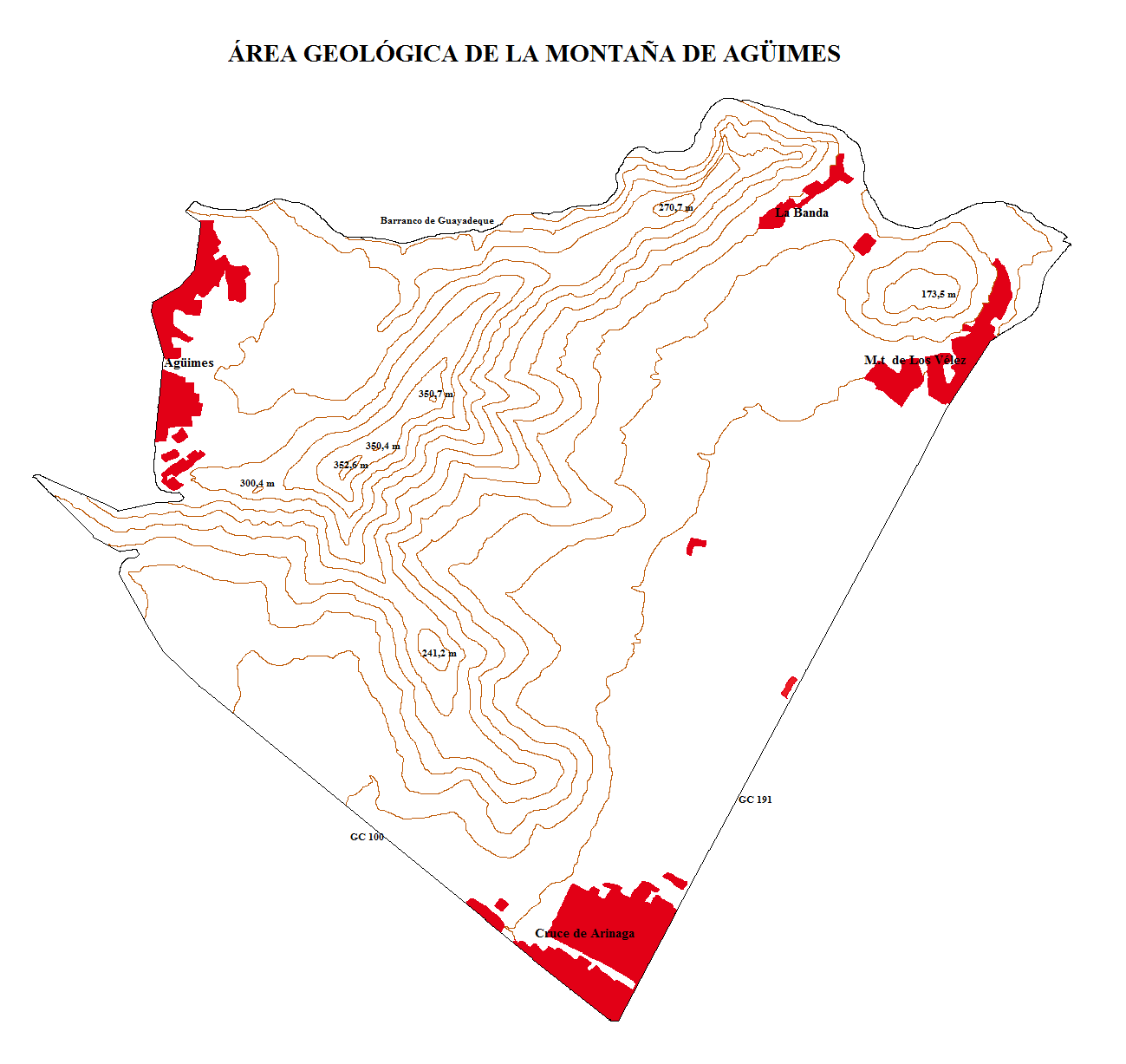 Mapa simple de la zona conocida como Montaña de Agüimes y poblaciones adyacentes, señaladas las carreteras principales, Guayadeque y altitudes destacadas